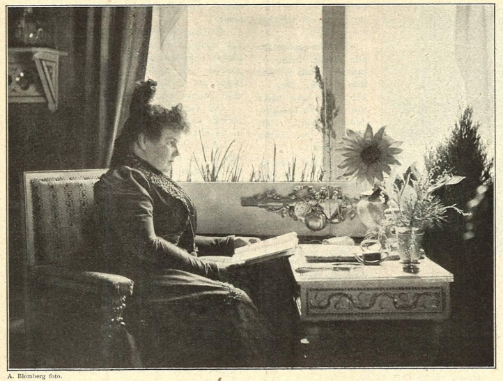 Prinzessin Mary Karadja 1899